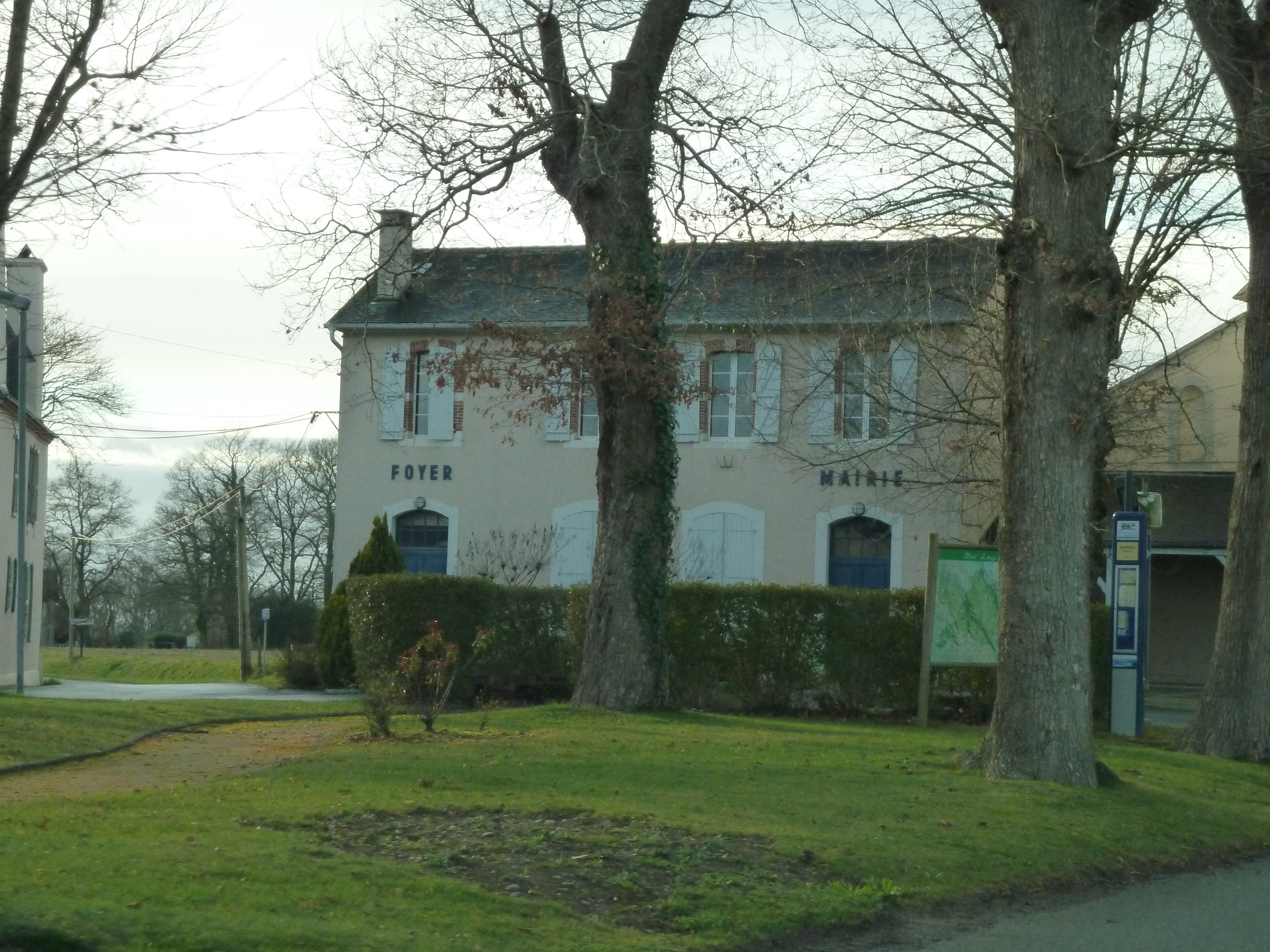 Mairie de Bournos